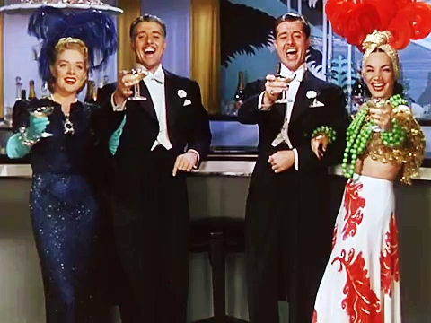 Imagem do trailer do filme That Night in Rio (1941). Os trailers dos filmes publicados antes de 1964 nos Estados Unidos são de domínio público.